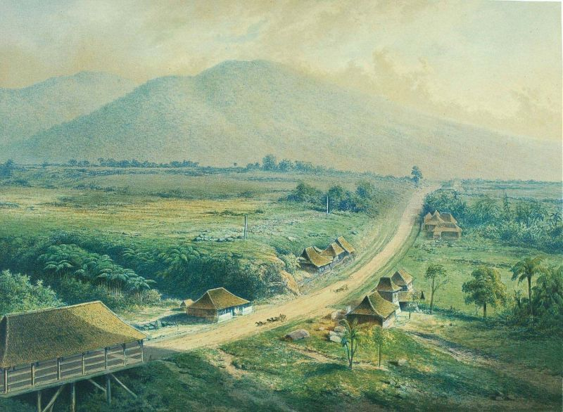 Litho. Kleurenlitho naar een oorspronkelijke tekening van L.H. W. M. de Stuers. Pagina 15 van de map "De Indische Archipel", Den Haag, 1865-1876, met daarin 24 kleurenlitho's, van objectnr. 3728-430 t/m 3728-479.. Een ziekenhuis in Gadok